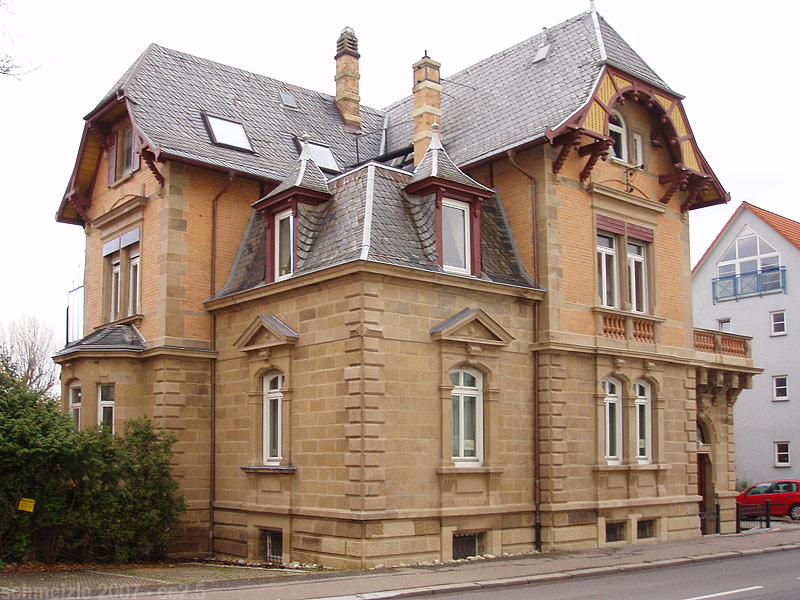 Direktorenvilla der ehemaligen Zwirnerei Ackermann in Heilbronn-Sontheim, Kolpingstraße 3; erbaut 1886 nach Entwurf der Heilbronner Architekten Hermann Maute und Theodor Moosbrugger; unter Denkmalschutz